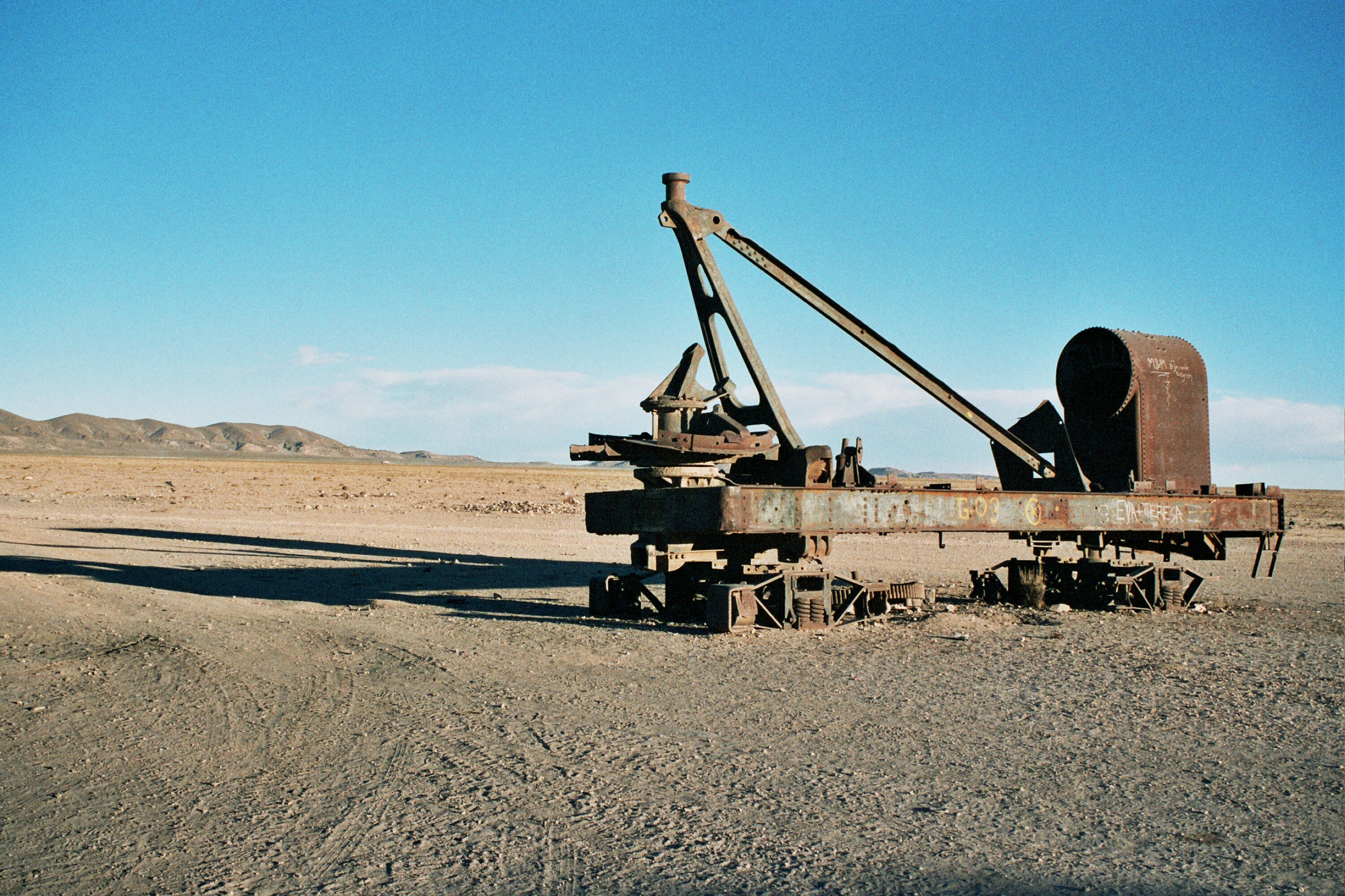 rostender Zug auf dem Zugfriedhof von Uyuni